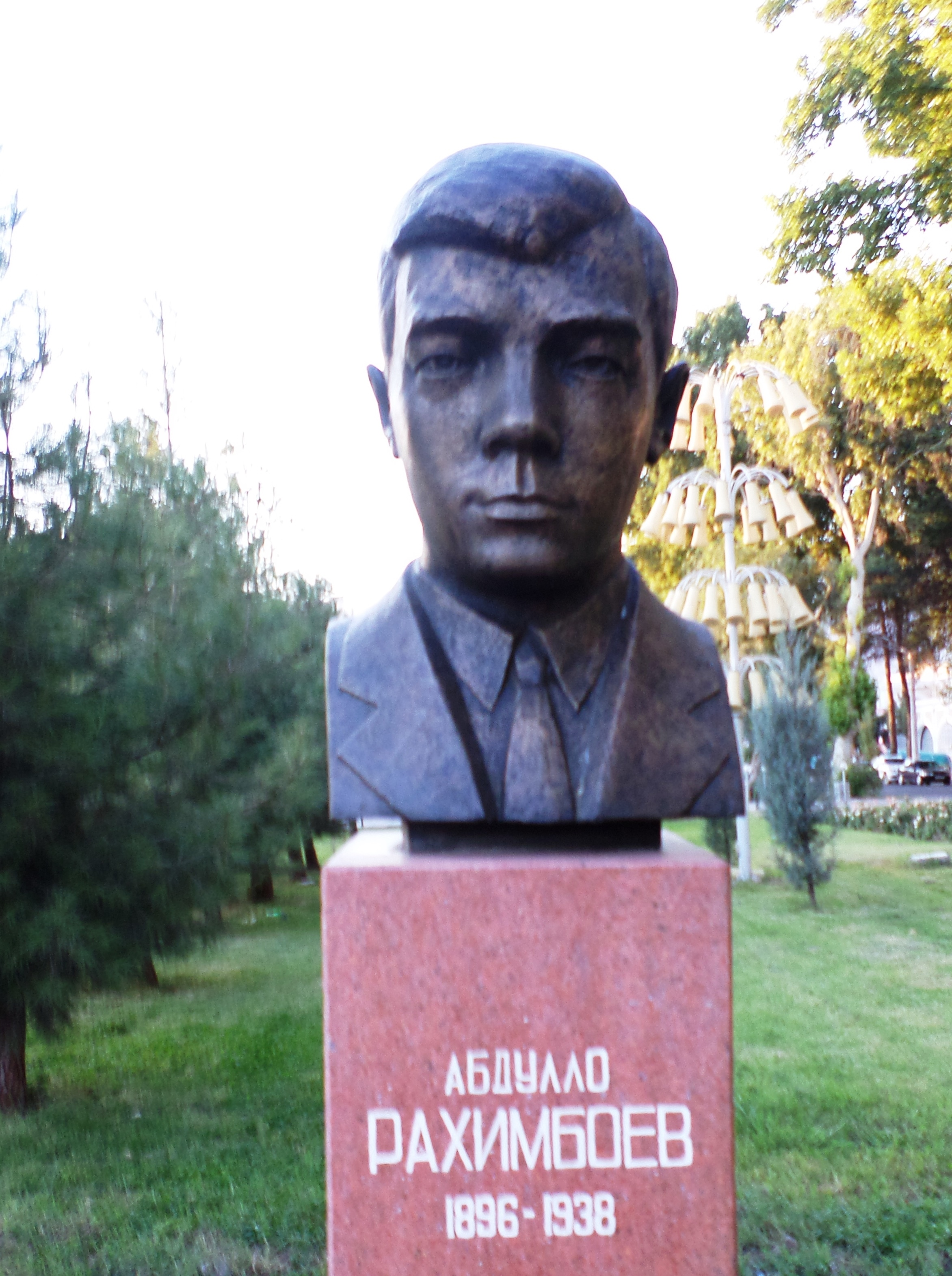 Абдулло Рахимбаев, участник установления советской власти в Таджикистане, г ХуджандТоҷикӣ: Абдулло Раҳимбоев - ходими давлатӣ ва ҳизбии ҶШС Тоҷикистон